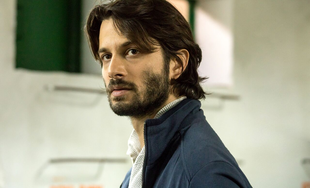 מתוך הסרט מוטלים בספק